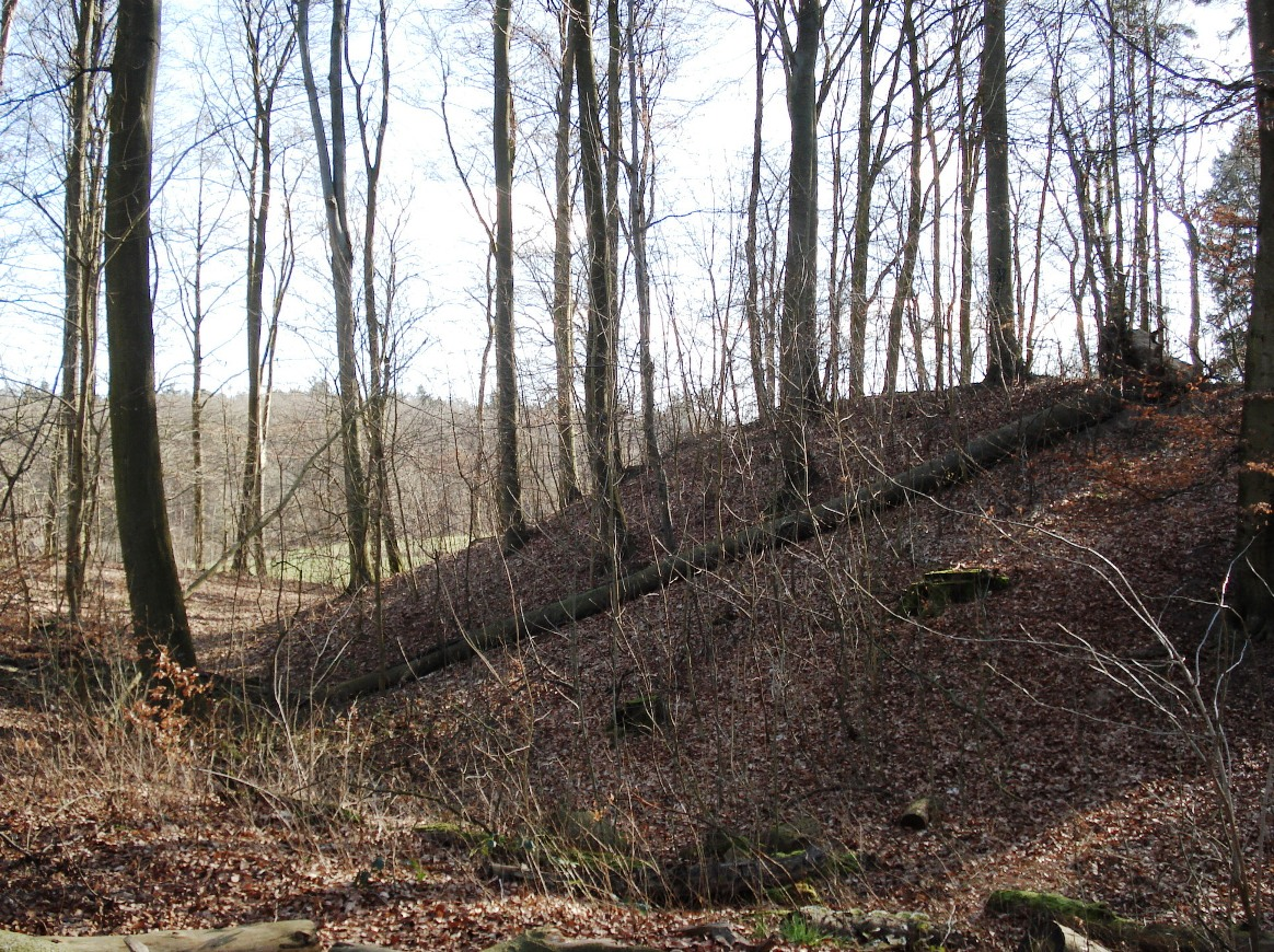 Burgwall Nord im Riesebusch in Bad Schwartau